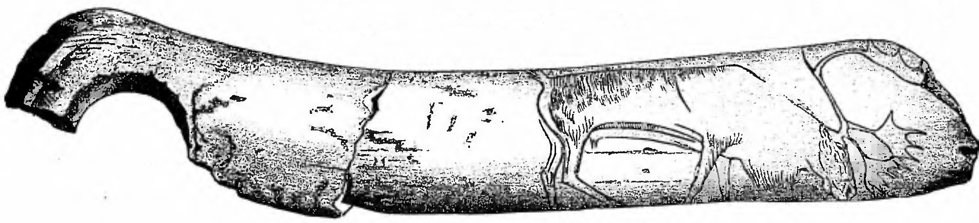 Fig 8. — Premiers dessins. Un renne broutant. (Débris trouvé à Thaingen.)